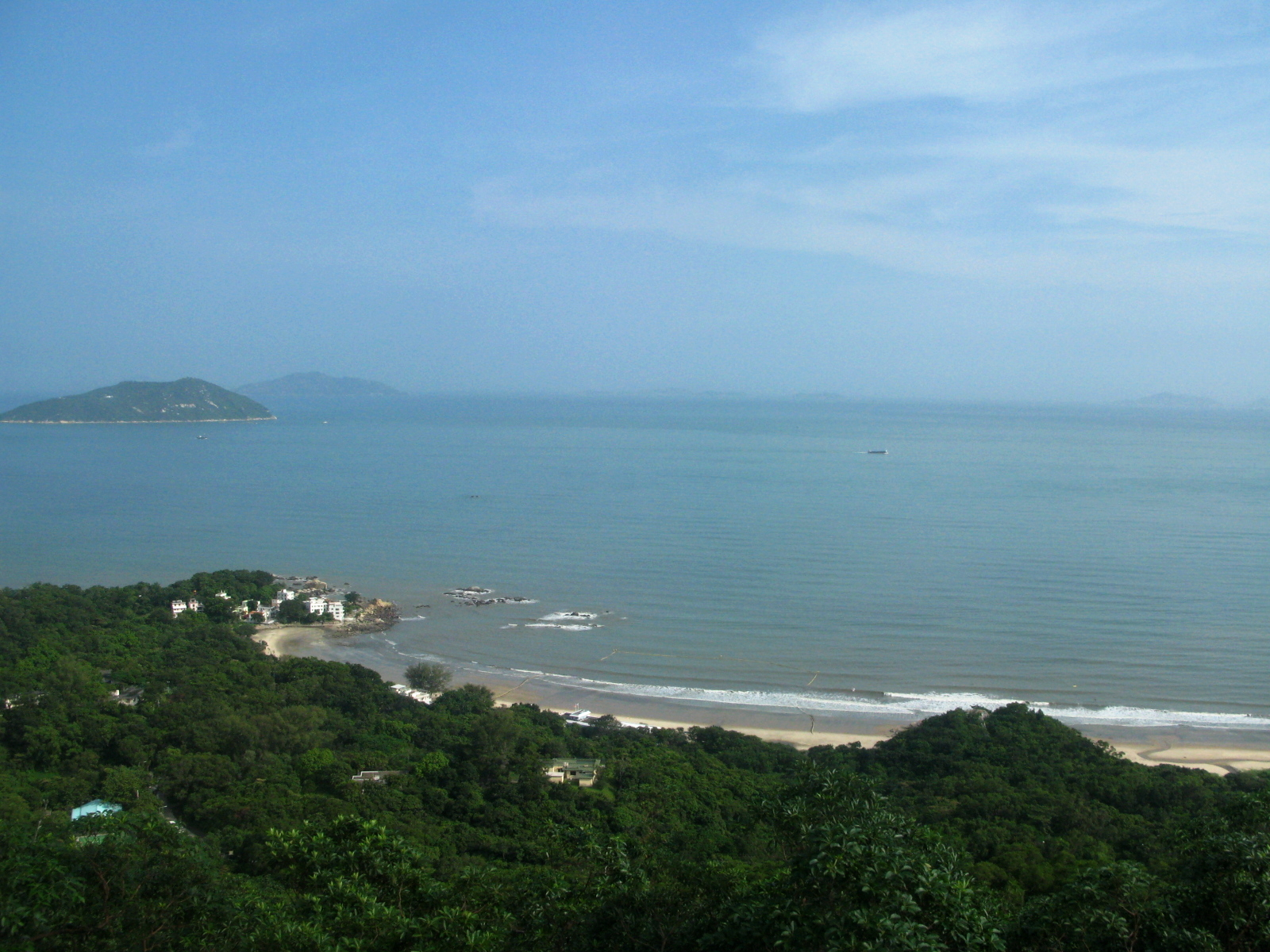 Cheung Sha, Lantau Island 長沙 (香港)